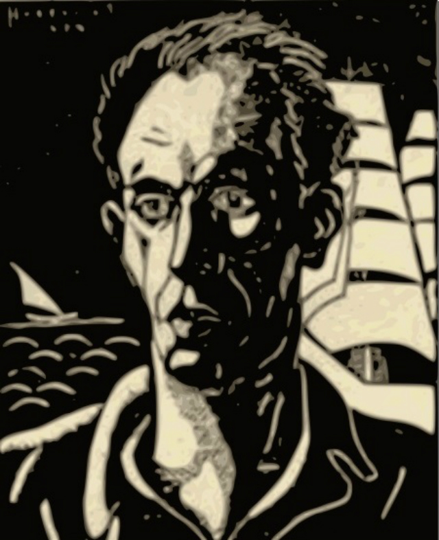 Alexandru Bassarab - Autoportret.